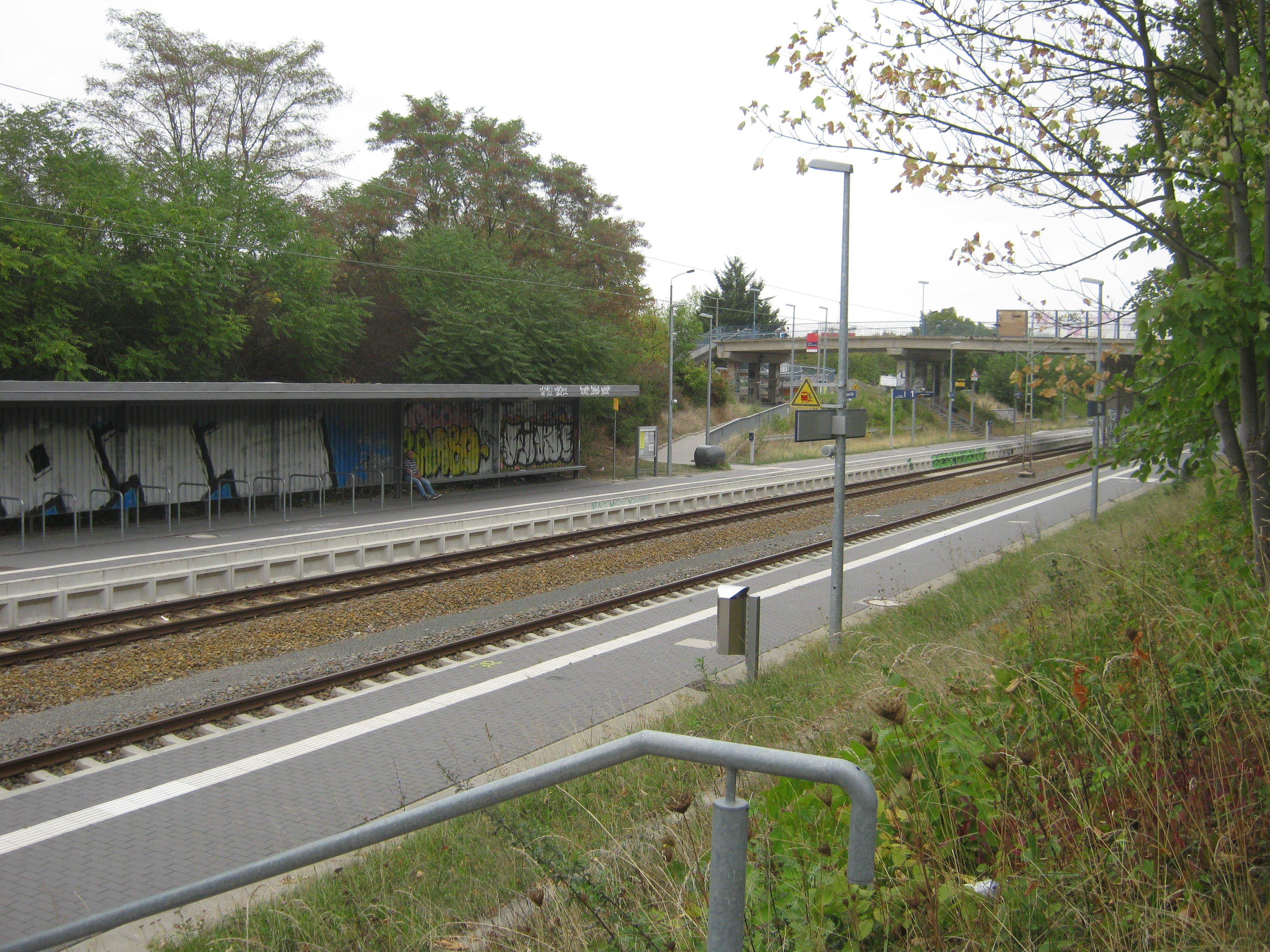 Blick auf den Haltepunkt Leipzig Grünauer Allee, einen Haltepunkt der S-Bahn Mitteldeutschland